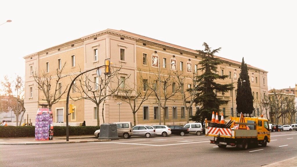 Casa de Maternitat de Lleida, gener 2015